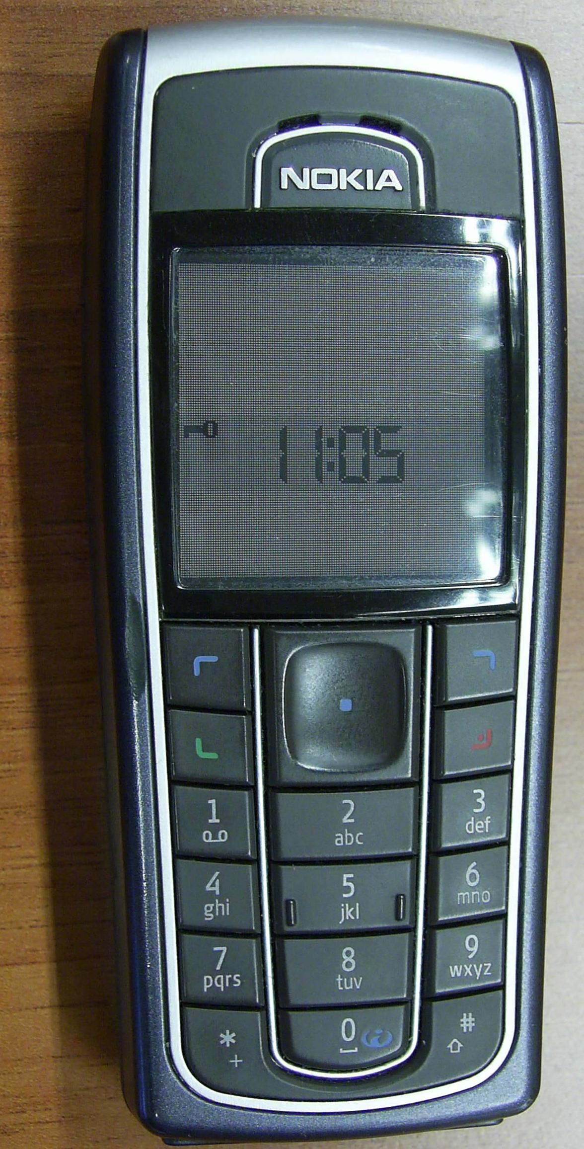 Teléfono móvil Nokia 6230i